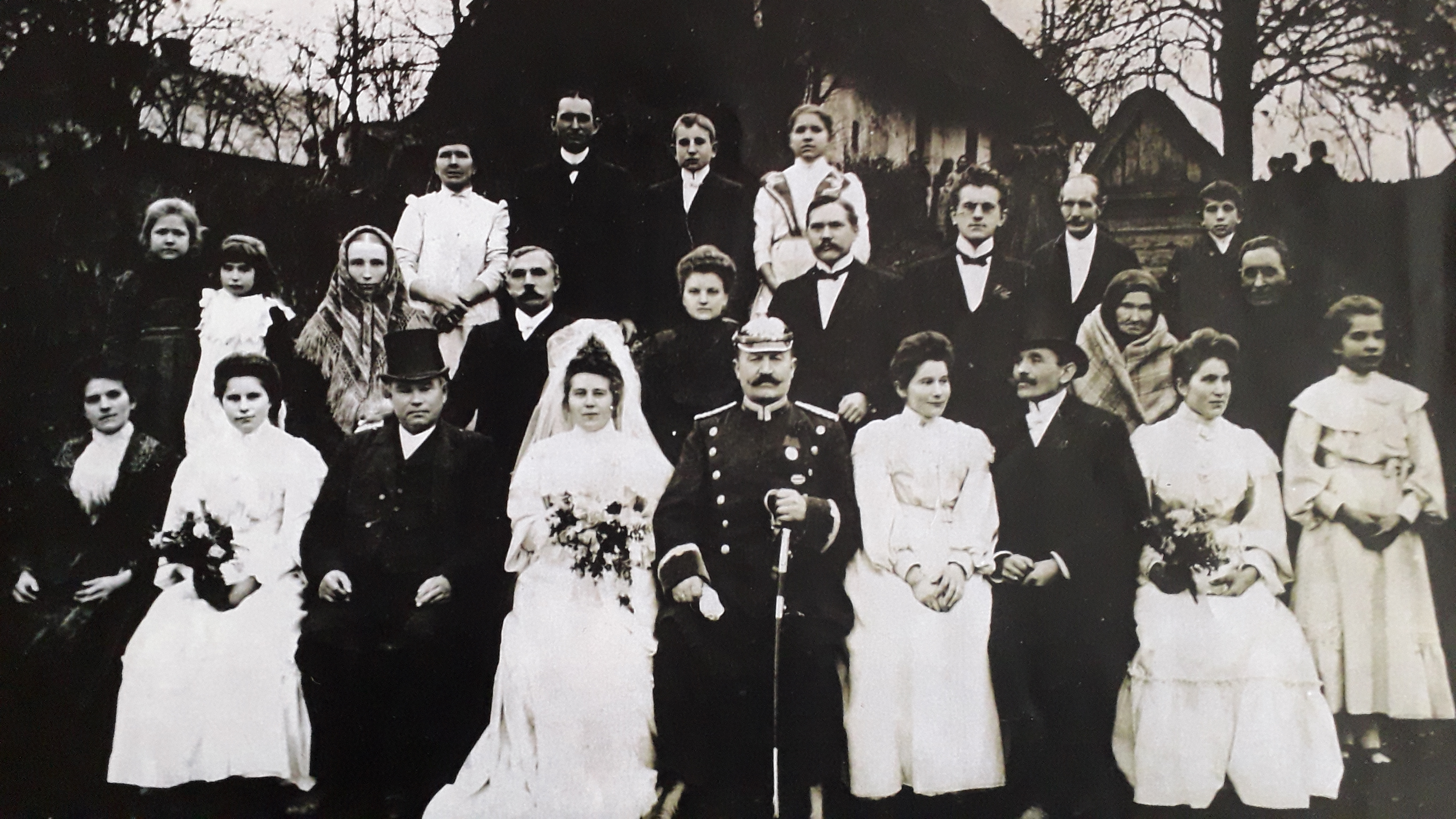 Oleszka